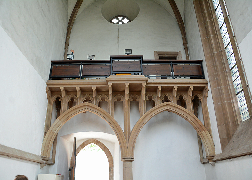 Magdeburg, Inneres der Magdalenenkapelle